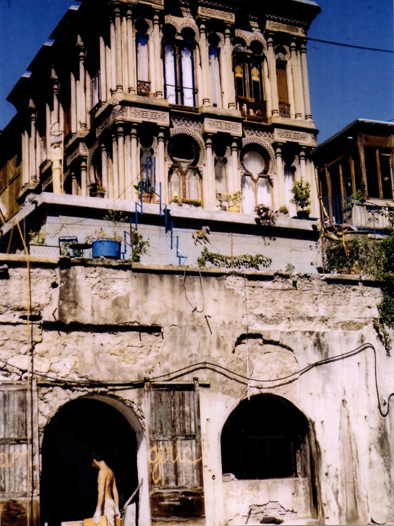 La Casamaures en 1986 par Colas. La Casamaures, Saint-Martin-le-Vinoux, France.